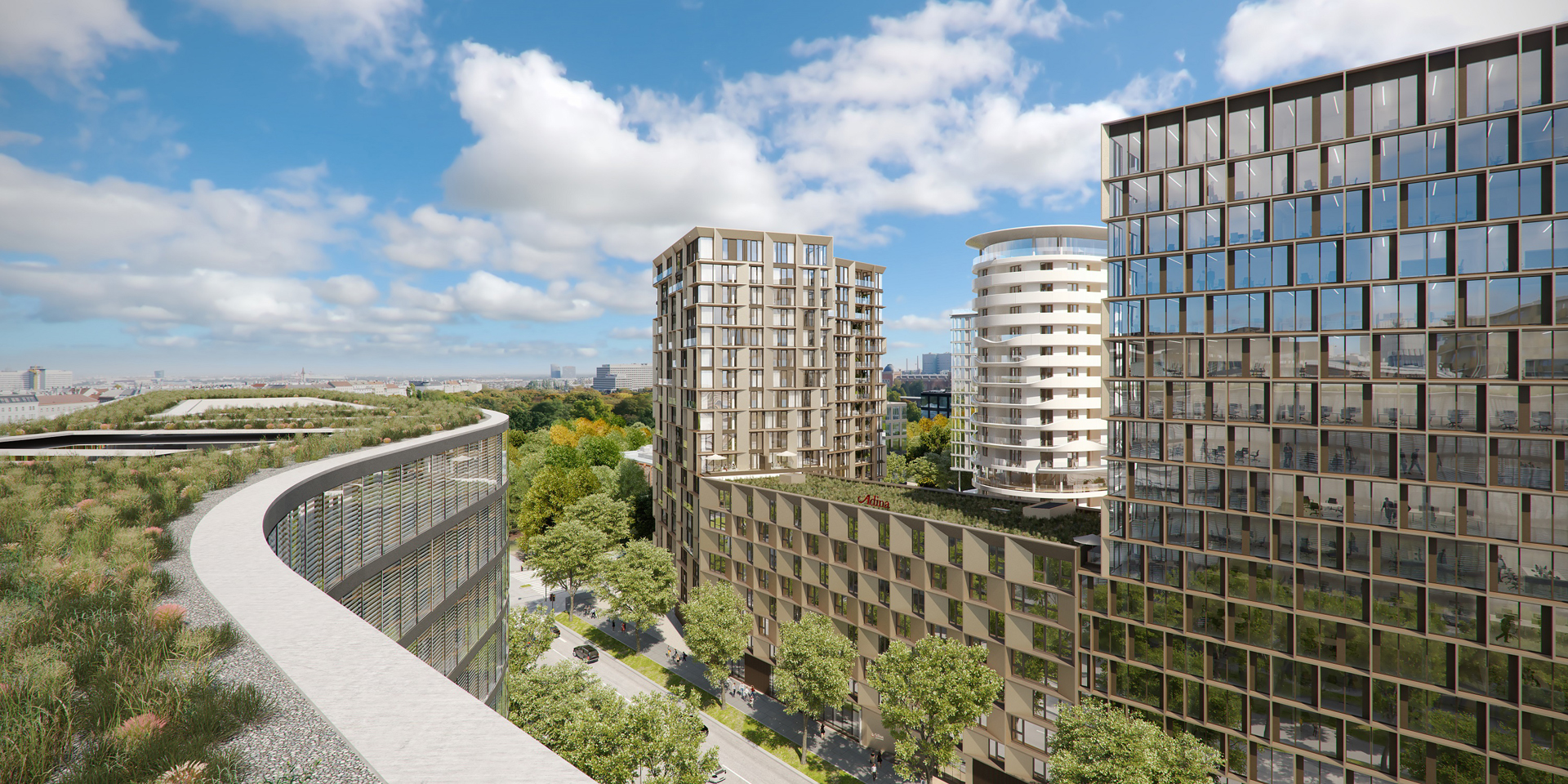 Die drei Baukörper aus der Feder von Delugan Meissl Associated Architects (DMAA)